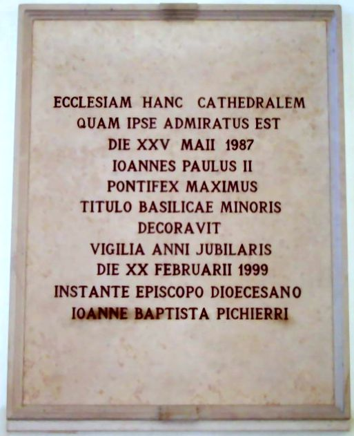 Iscrizione in memoria dell'elevazione a Basilica del Duomo Tonti.